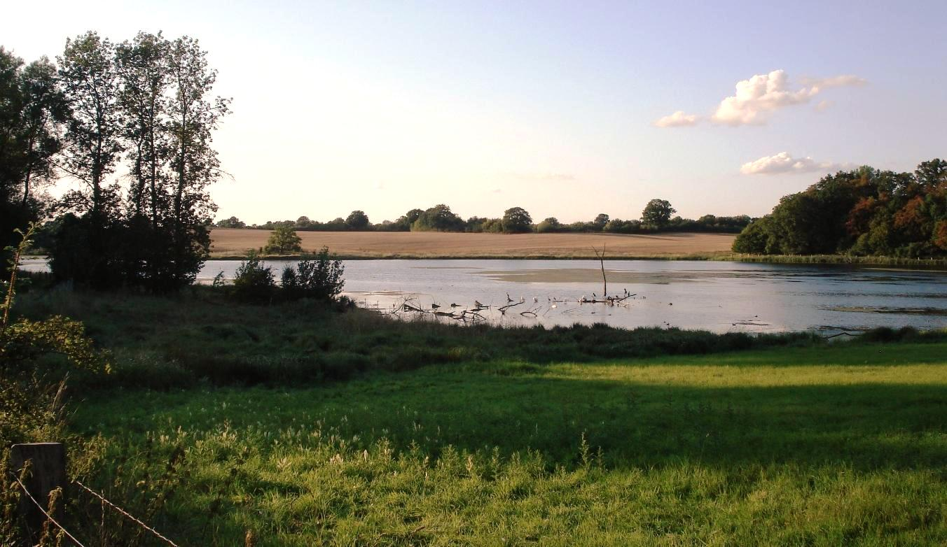 Der Dodauer See